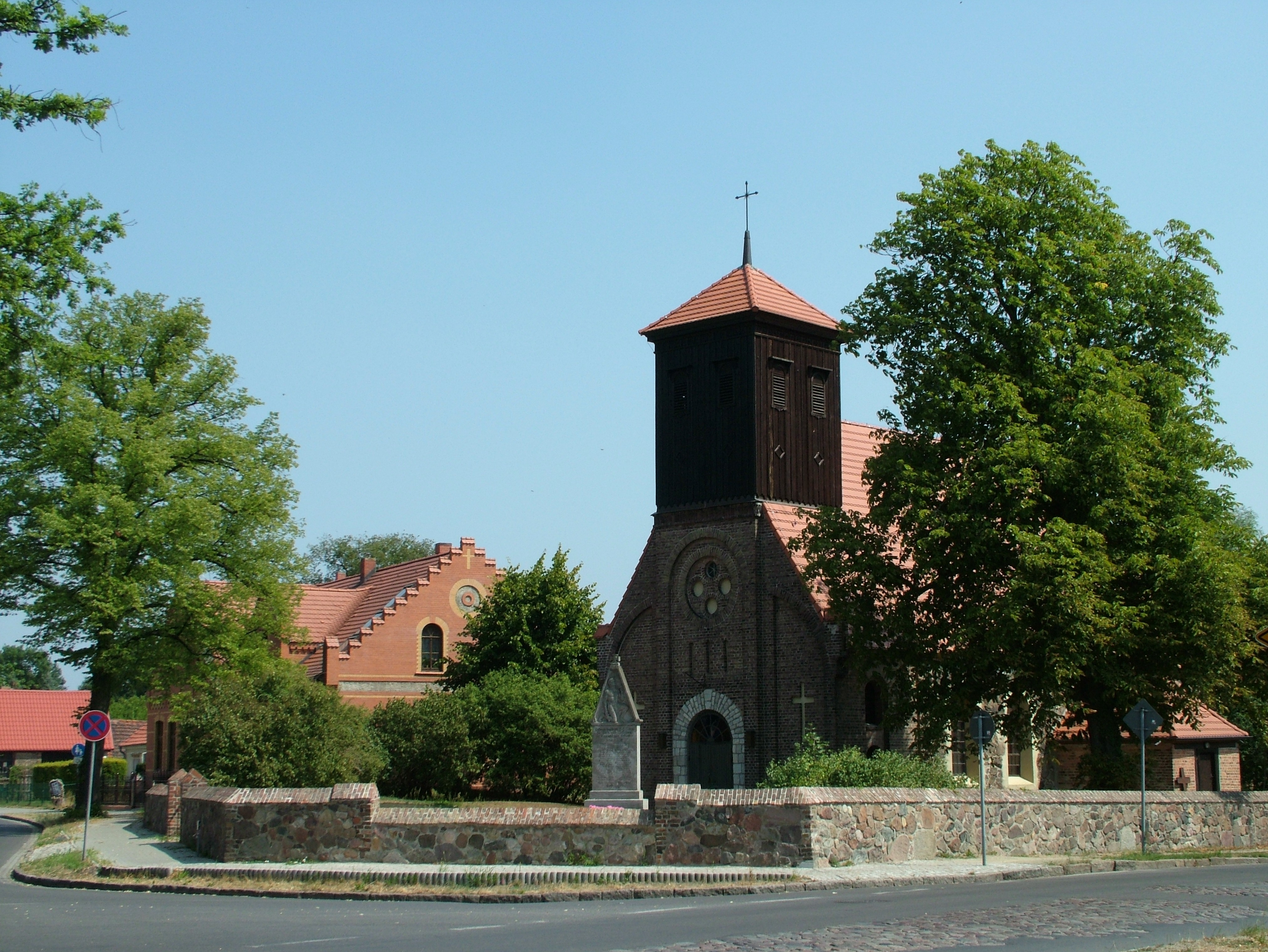 Bestensee, Brandenburg, Die Kirche aus dem 14. Jahrhundert